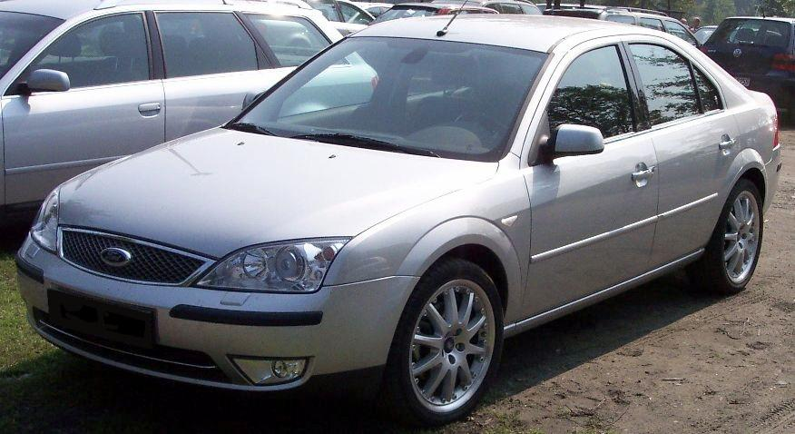 Ford Mondeo 2004